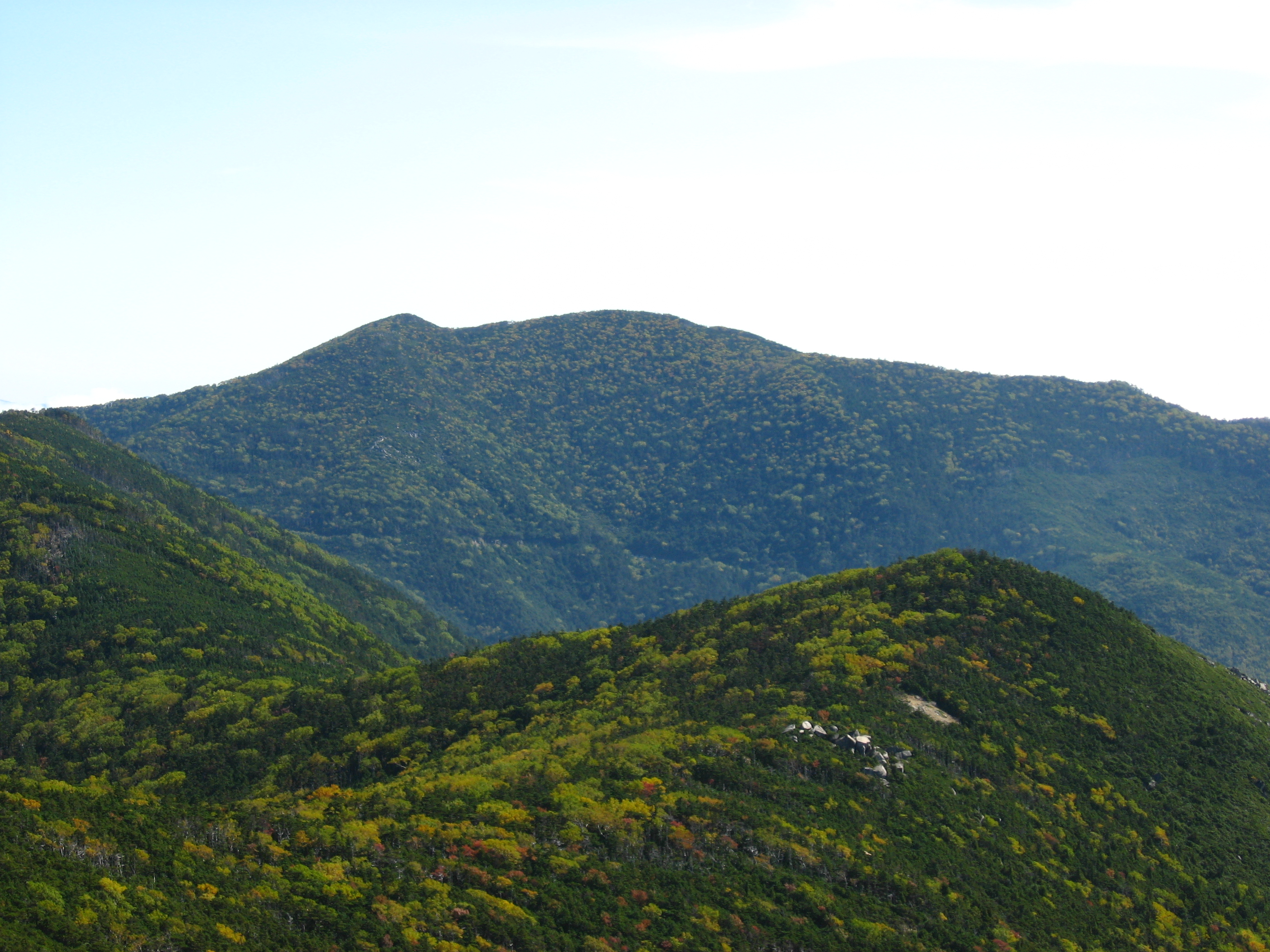 金峰山から見た北奥千丈岳